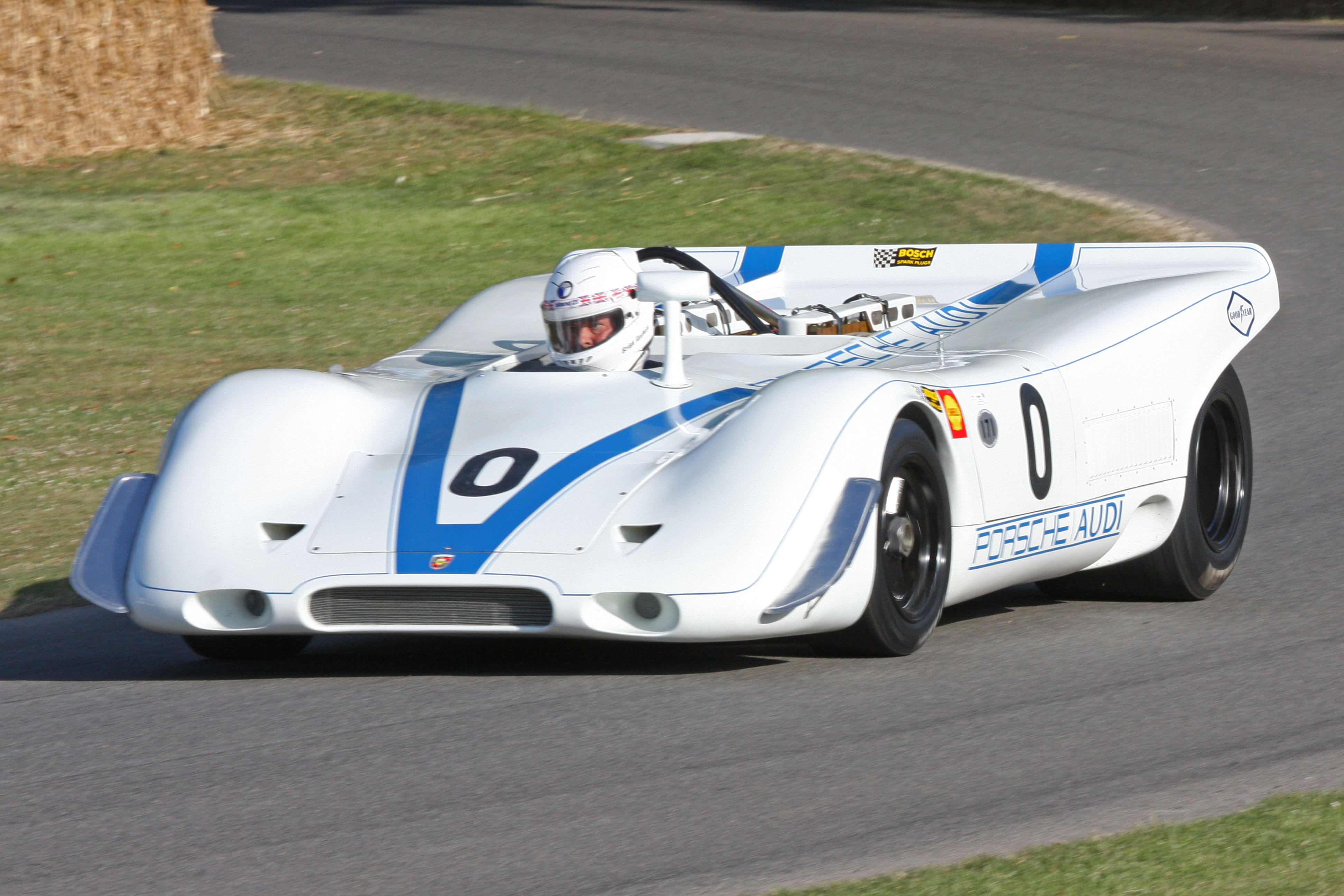 1969 Porsche 917 P/A ex-Joseph Siffert